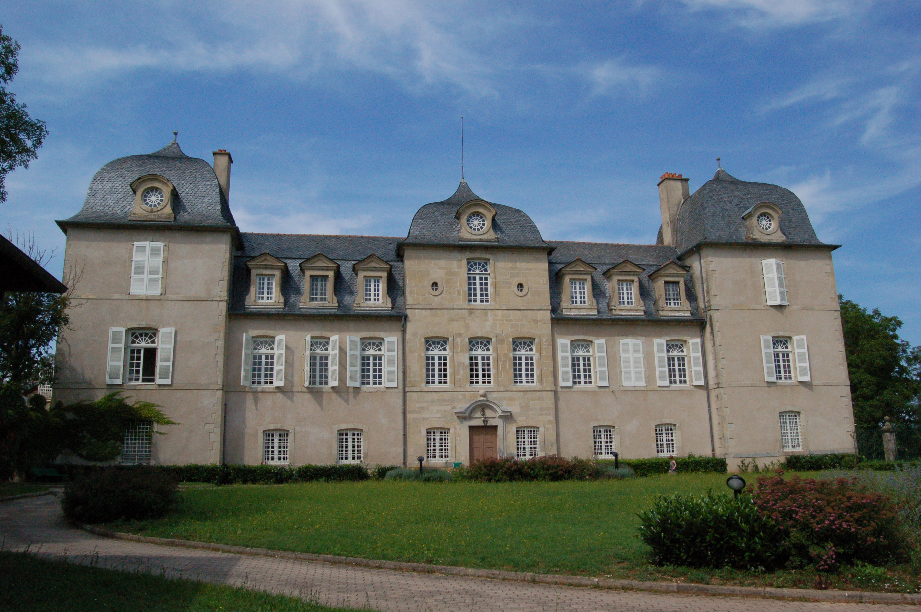 Château de Floyrac (12)